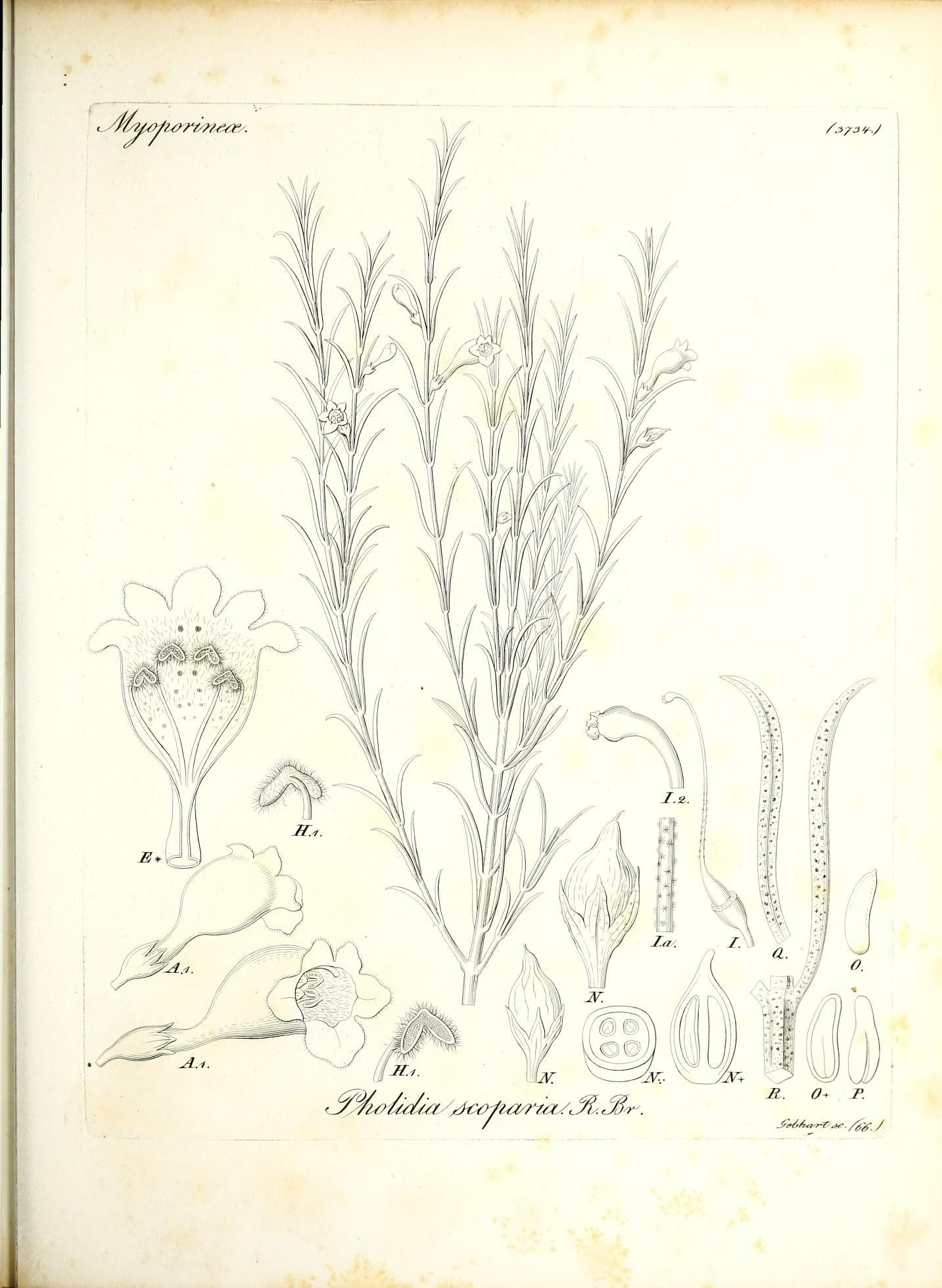 tyftu/rfi z&rtmeae/. /^739-J ^y^i^/idua-stkx^ J&~. n. o+ P.